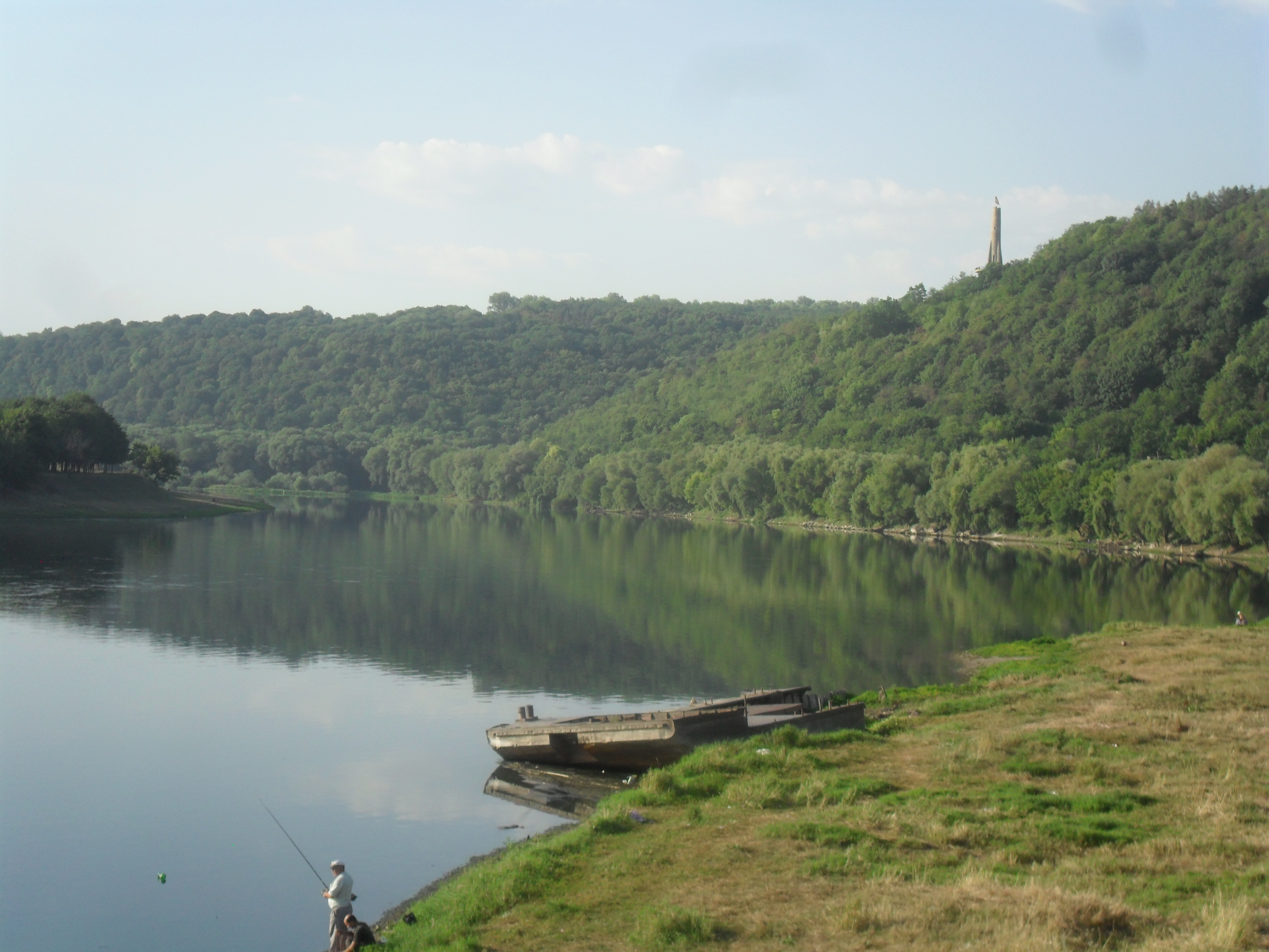 Дністровський краєвид у м. Сороки. Вид на Свічу подяки